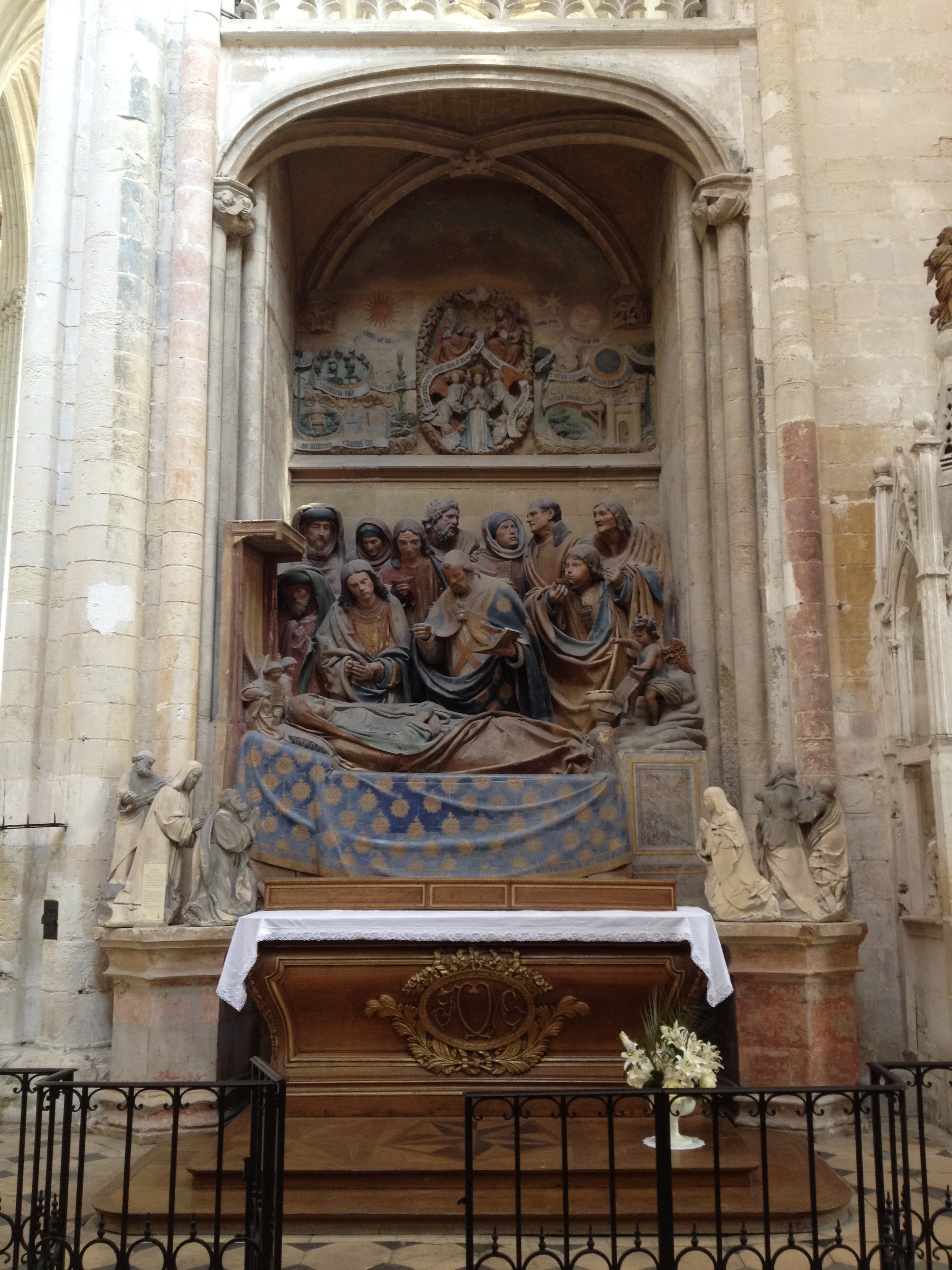 Dormition de la Vierge, groupe sculpté du XVe siècle de Guido Mazzoni, avec au-dessus un bas-relief de son Ascension, dans le bras sud du transept.